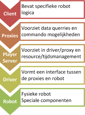 Visuele voorstelling van de verschillende niveau's in Project Player